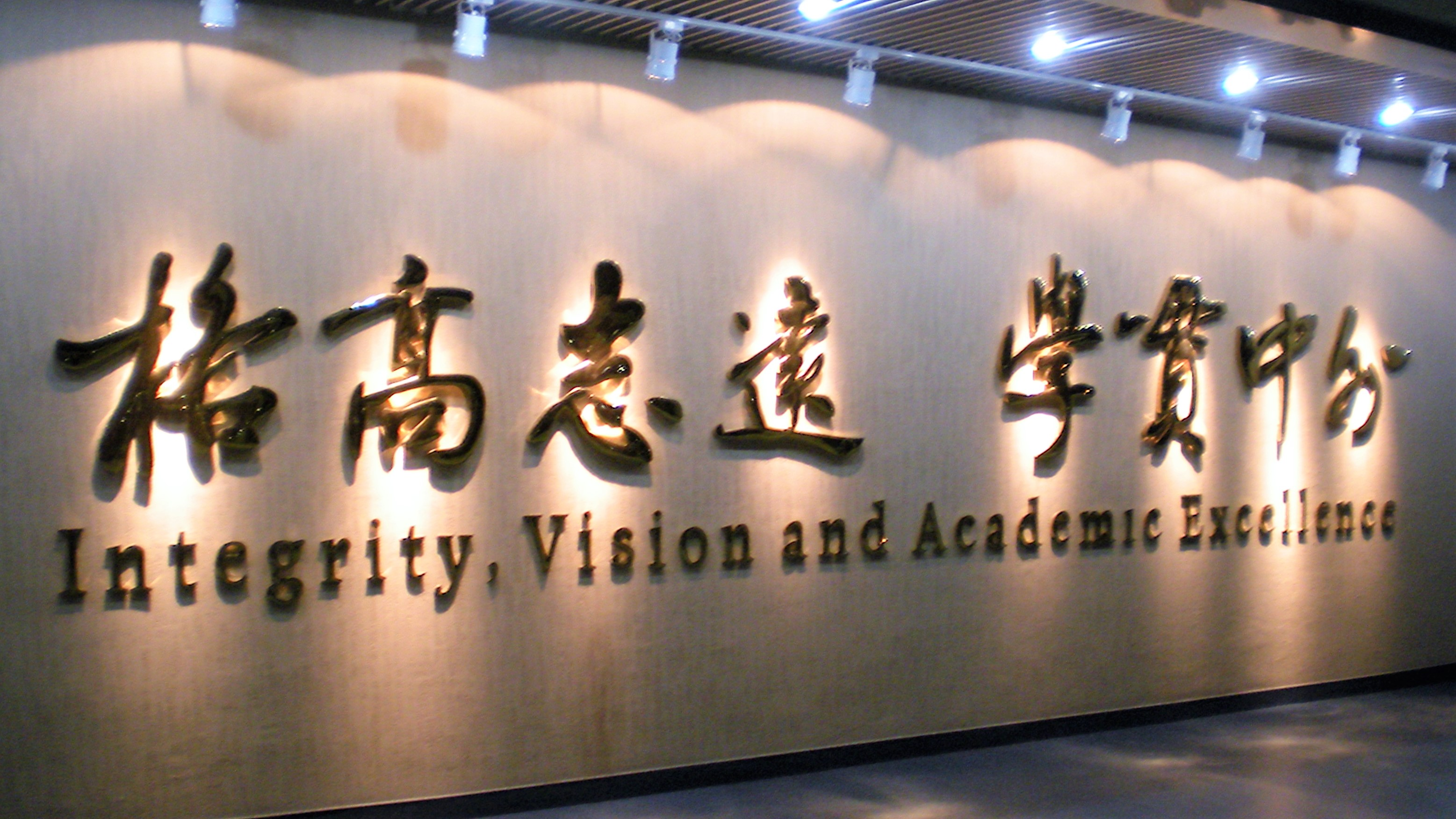 Motto Wall of SISU, in Education Hall, Songjiang Campus